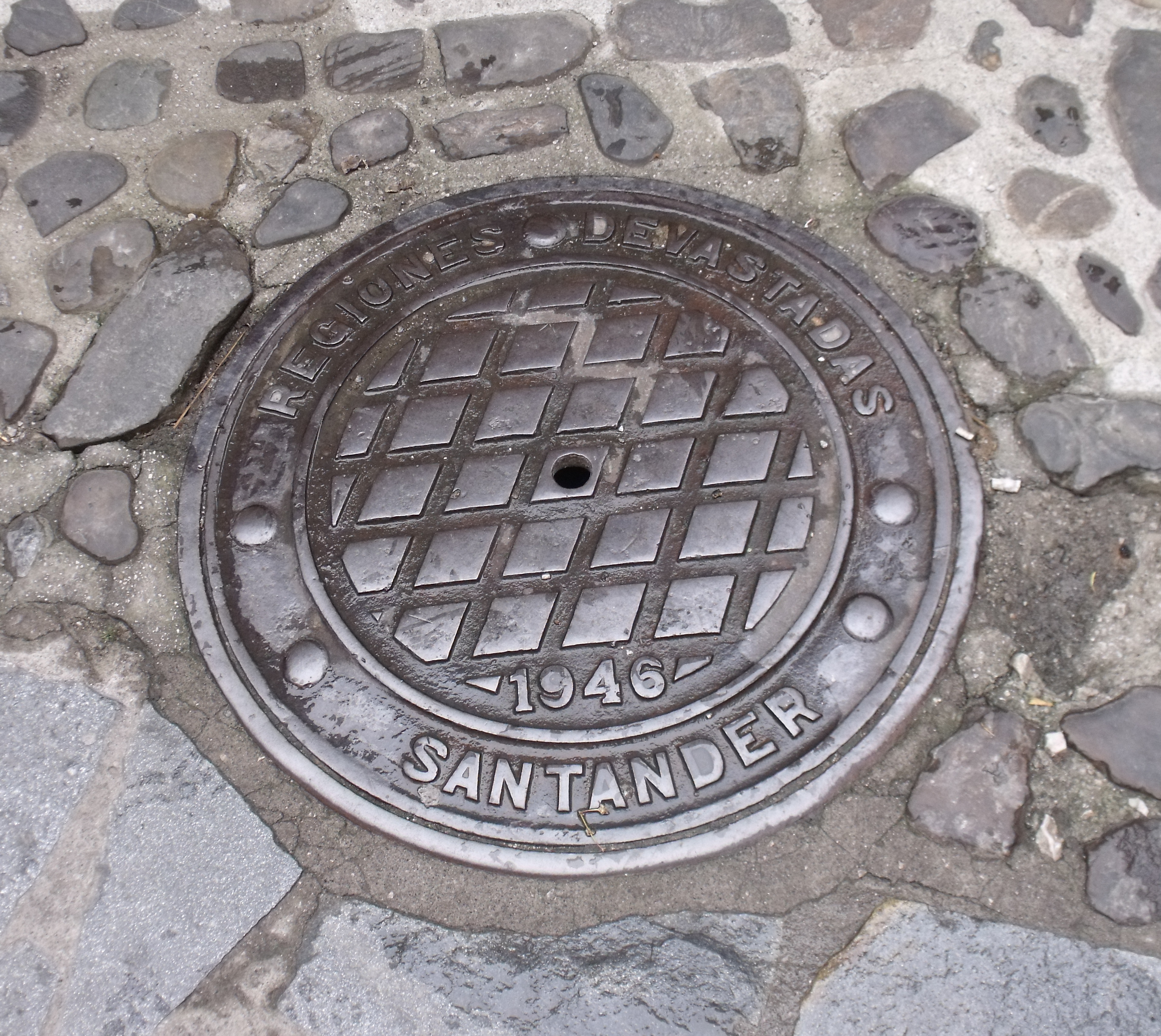 Trapa de servicios en Potes. Tras sufrir daños durante la Guerra Civil Española, Potes fue reconstruida por Regiones Devastadas. La denominación Santander hace referencia a la provincia, posteriormente llamada Cantabria.